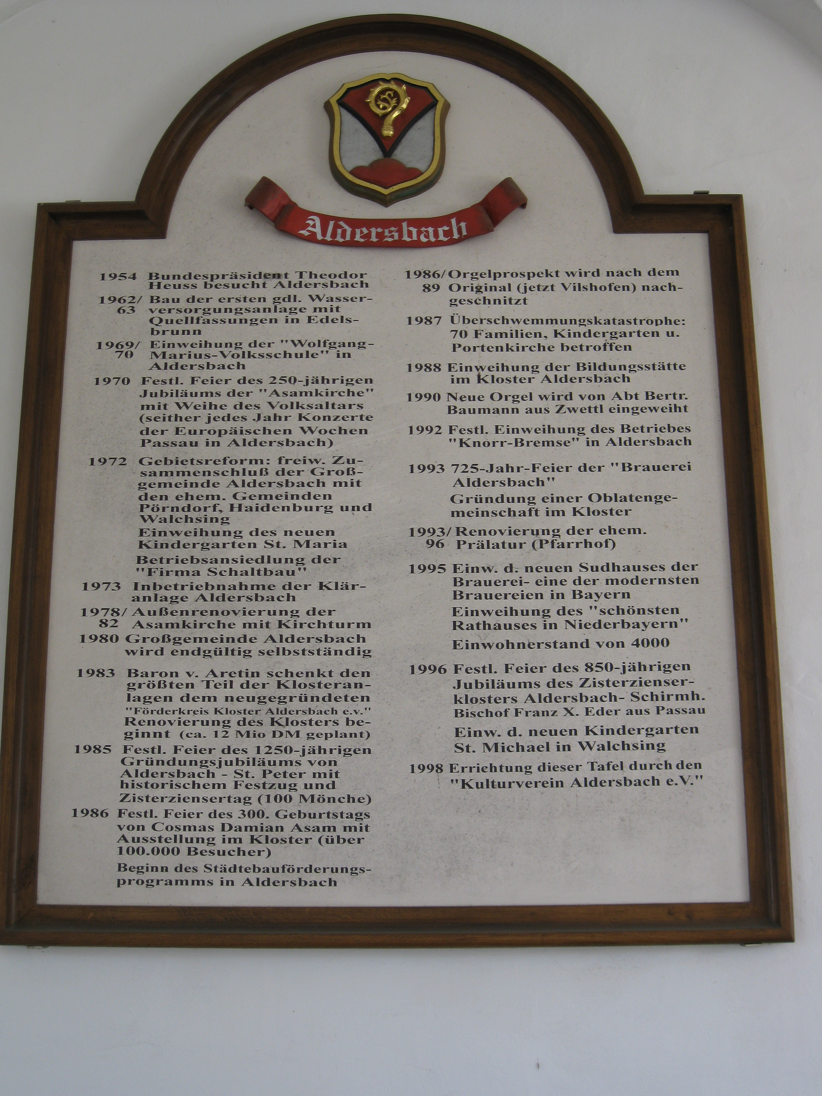 Tafeln über die Geschichte des Ortes und Klosters Aldersbach, Aldersbach, Bayern